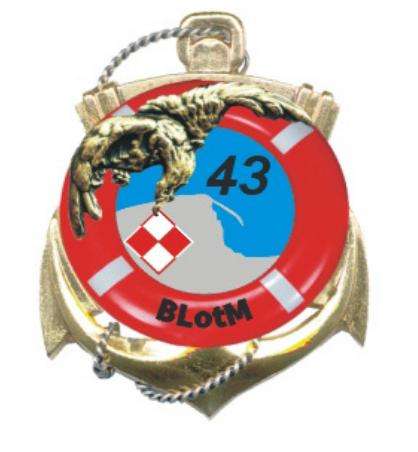 Odznaka pamiątkowa 43 Bazy Lotnictwa Morskiego ustanowiona decyzją Nr 271/MON MINISTRA OBRONY NARODOWEJ z dnia 11 września 2012 r. w sprawie wprowadzenia odznaki pamiątkowej 43. Bazy Lotnictwa Morskiego